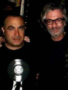 שלומי ברכה ויובל בנאי